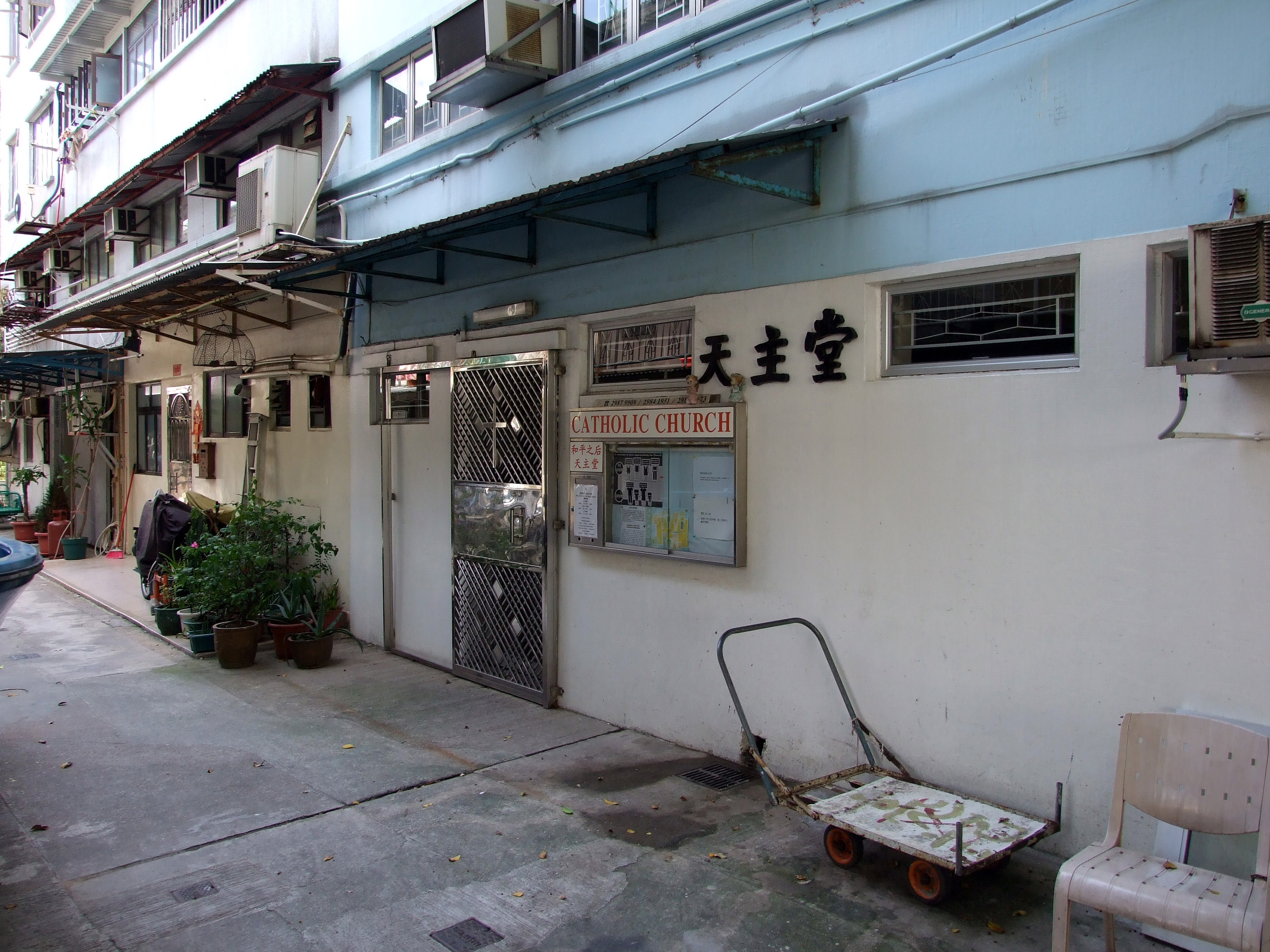 中文（香港）: 和平之后天主堂